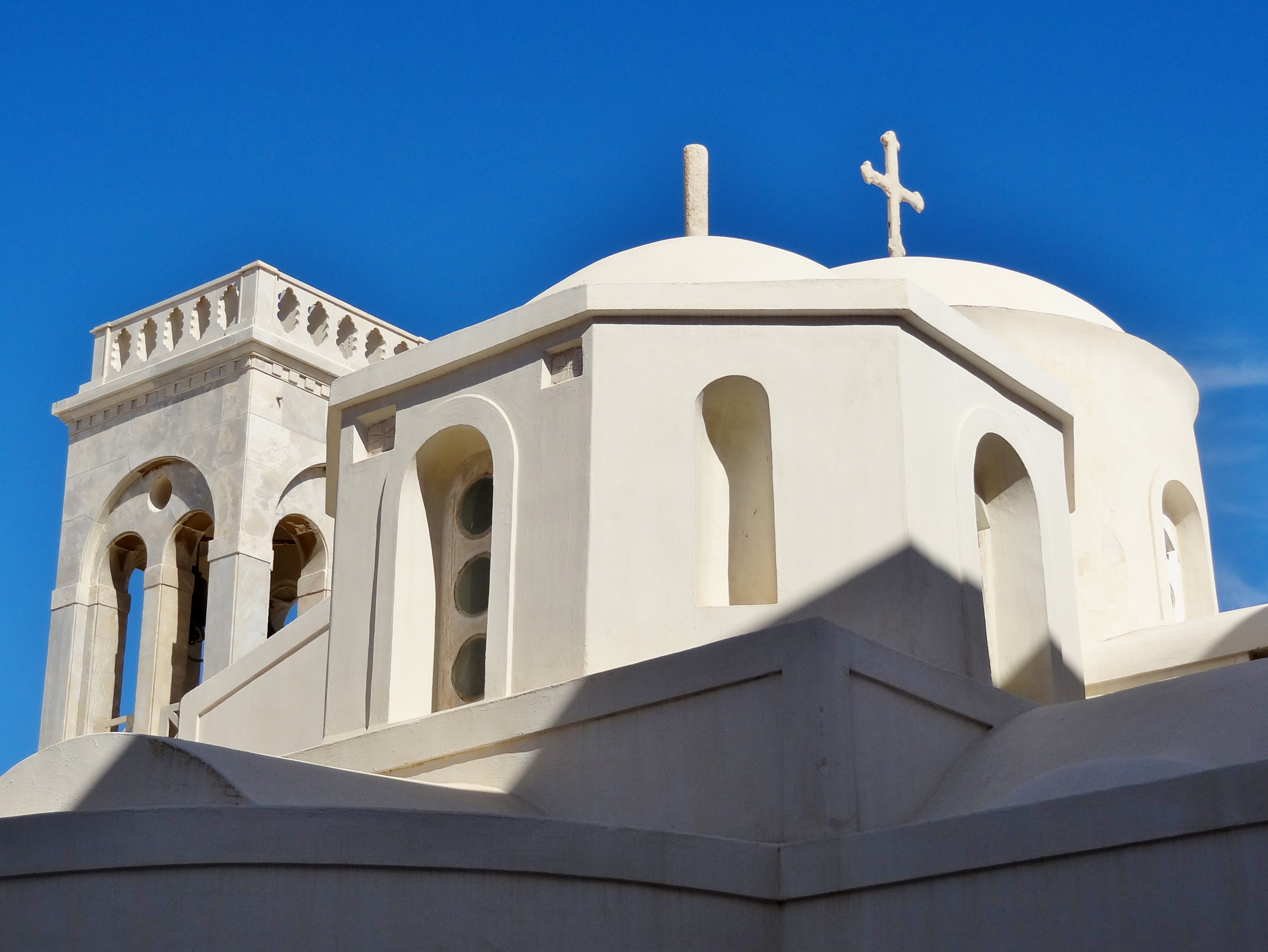 Katholische Kirche in Chora, Naxos, Kykladen, Griechenland